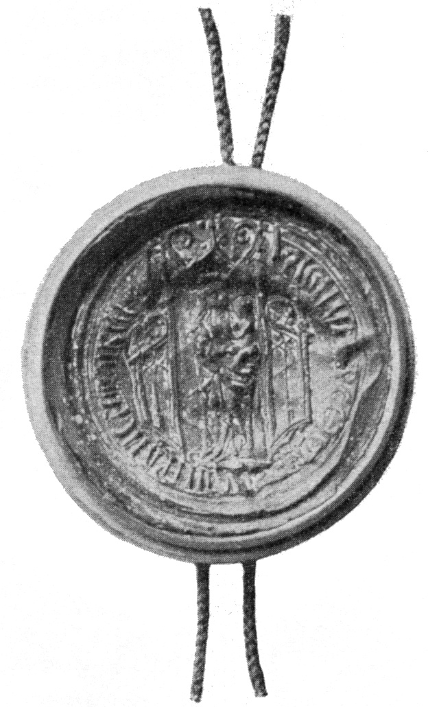 Originalbeschriftung: Abb. VII. Siegel der Universität an der Urk. vom 9. Juli 1518 im Geh. Staatsarchiv. Umschrift: SIGILLUM RECTORIS STUDII FRANGFURDII (?)